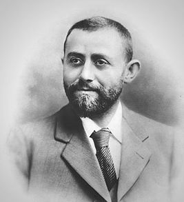 מיכאל מרקס